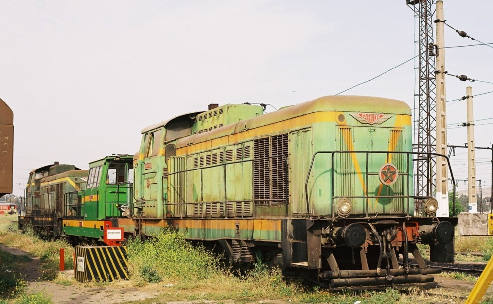 ONCF DG 221 au dépôt de Fès